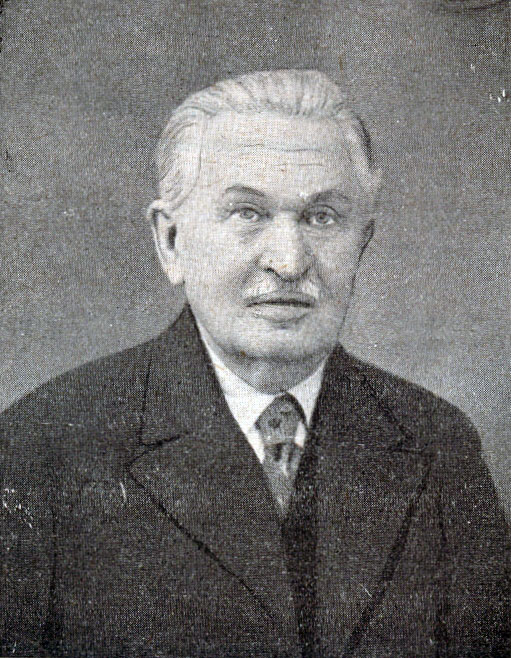 Karel Pařík (1857 - 1942), Český architekt.